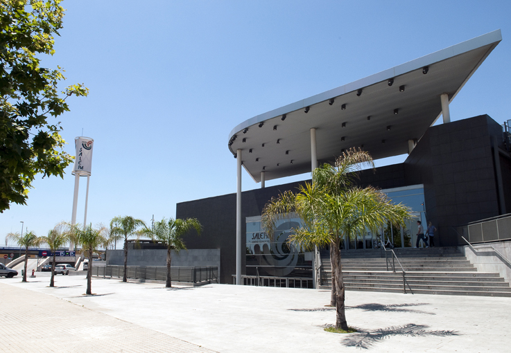 Fachada del Centro Comercial Salera en la ciudad de Castellón de la Plana